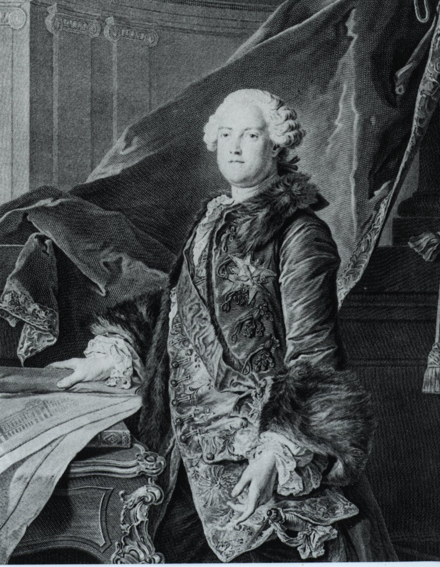 Portrait du Marquis de Marigny (1728-1781)